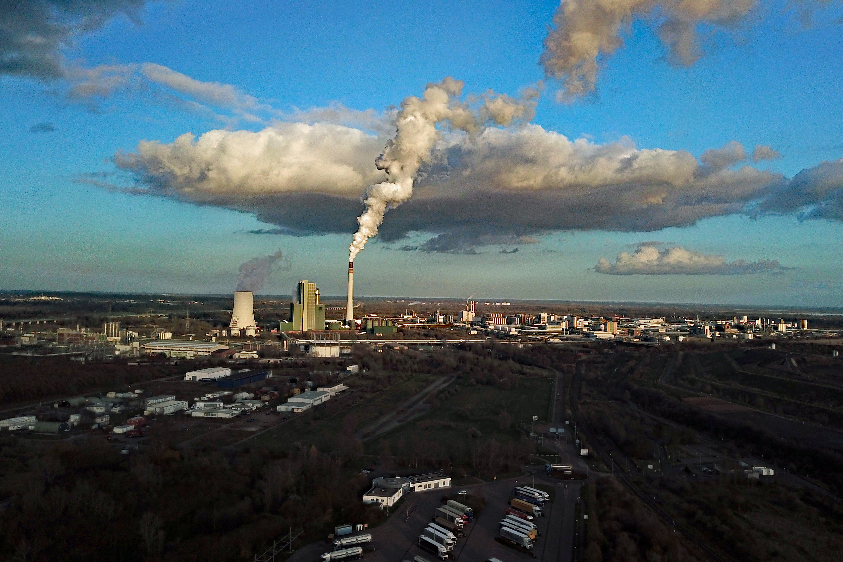 DOW Olefinverbund Standort Sschkopau (ehamlige Buna-Werke)